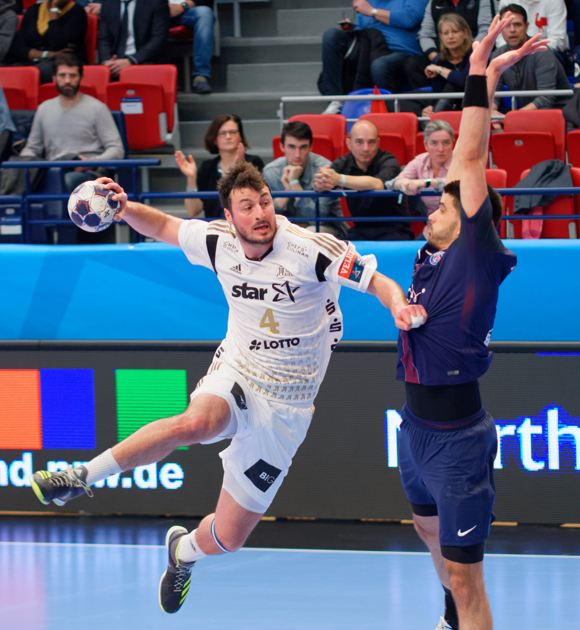 Rencontre de phase de groupe de la ligue des champions 2016-17 entre le PSG et le THW Kiel. A Coubertin, le 12 mars 2017.